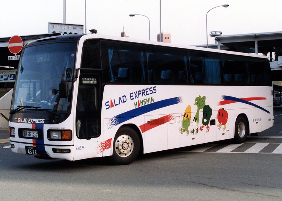 阪神電気鉄道 サラダエクスプレス（トワイライト神戸号） 三菱ふそう・エアロクィーンM P-MS729S